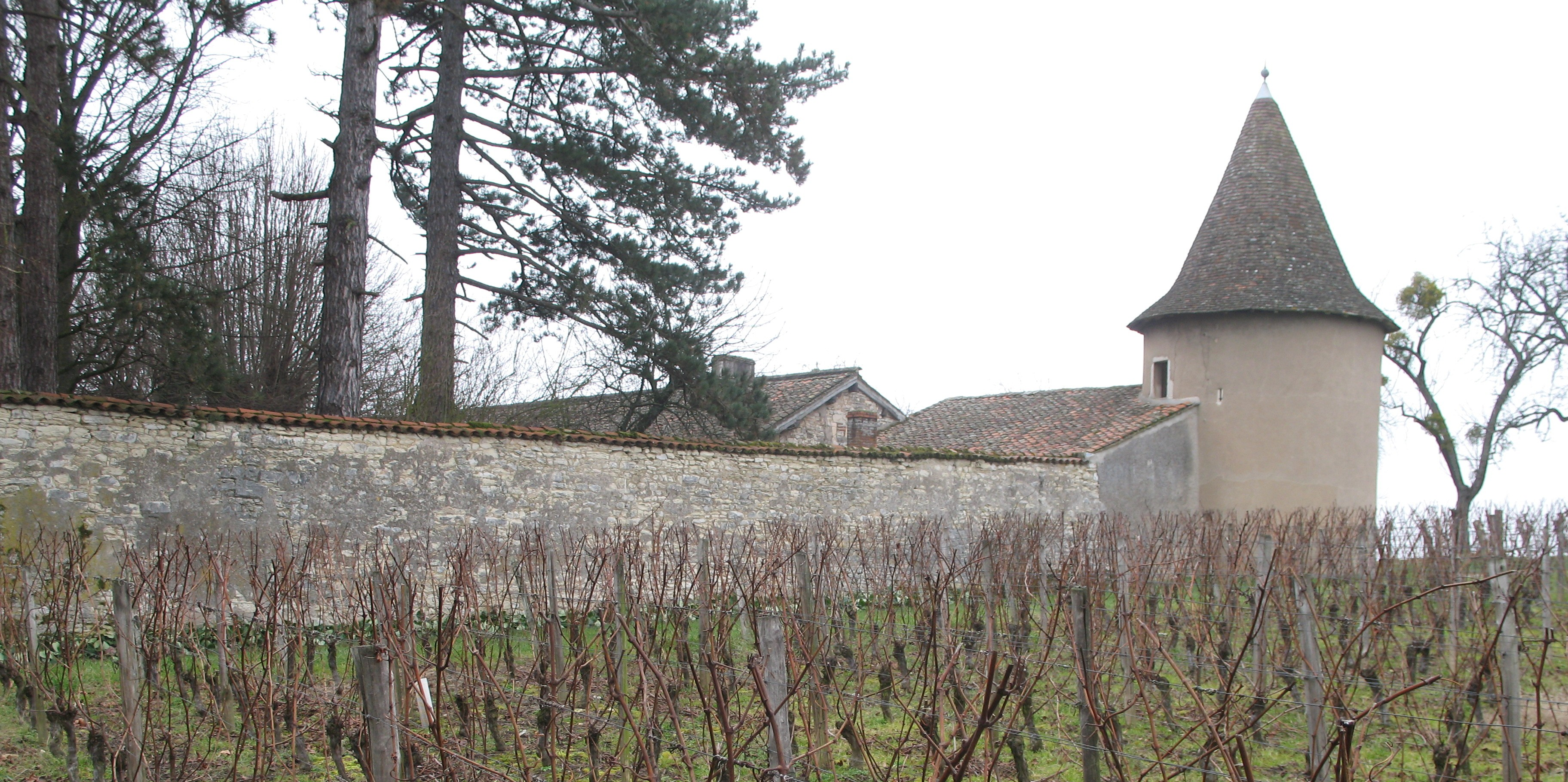 château de Marigny - Fleuville (Saône-et-Loire)